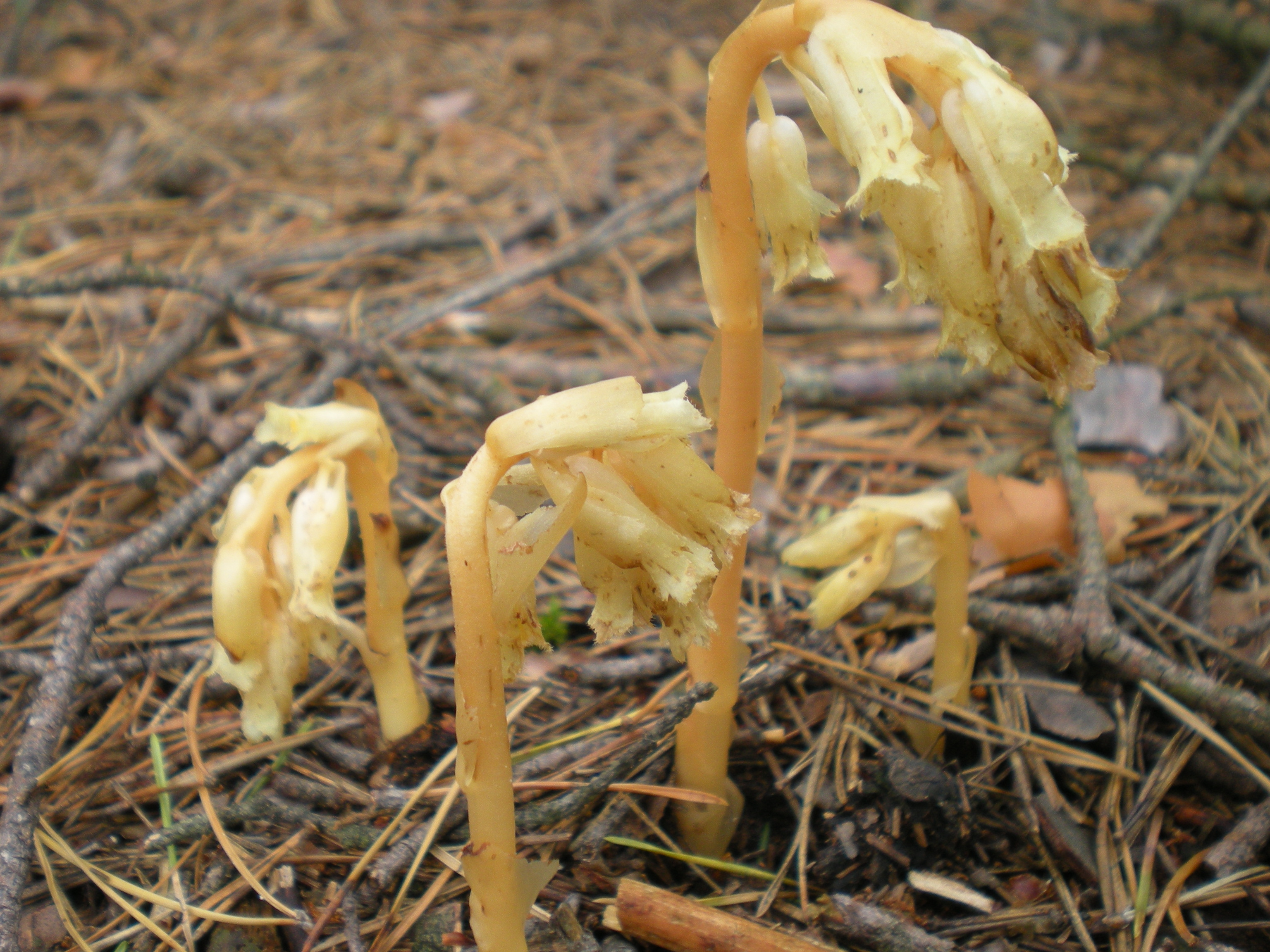 Fichtenspargel (Monotropa hypopitys) in Polen